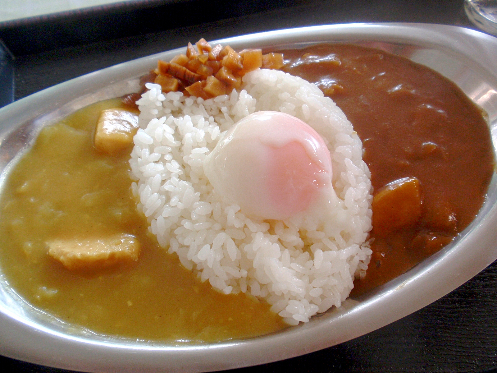 あいがけ神代カレー 抱返り売店にて